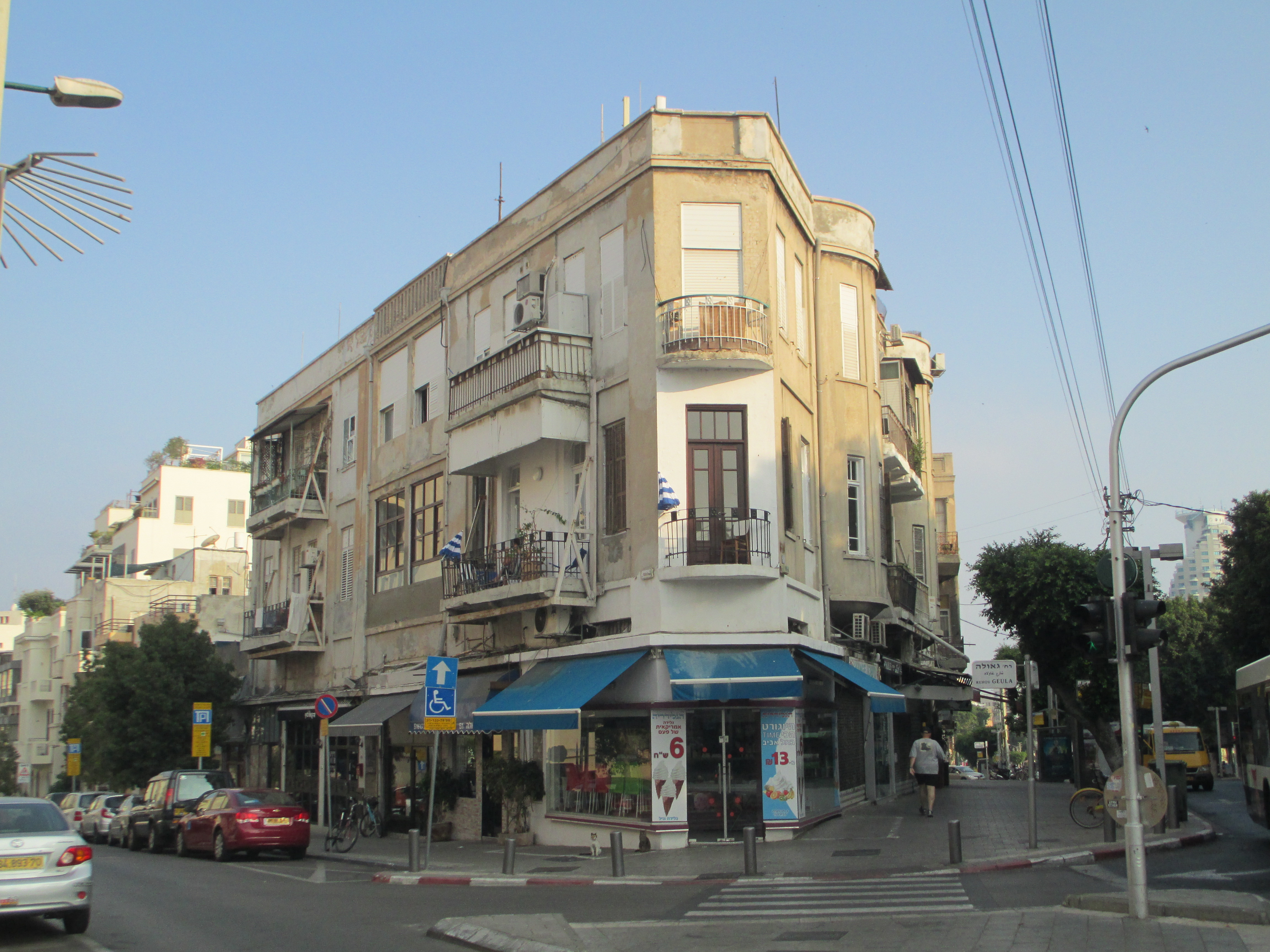 רח' אלנבי 50 פינת גאולה